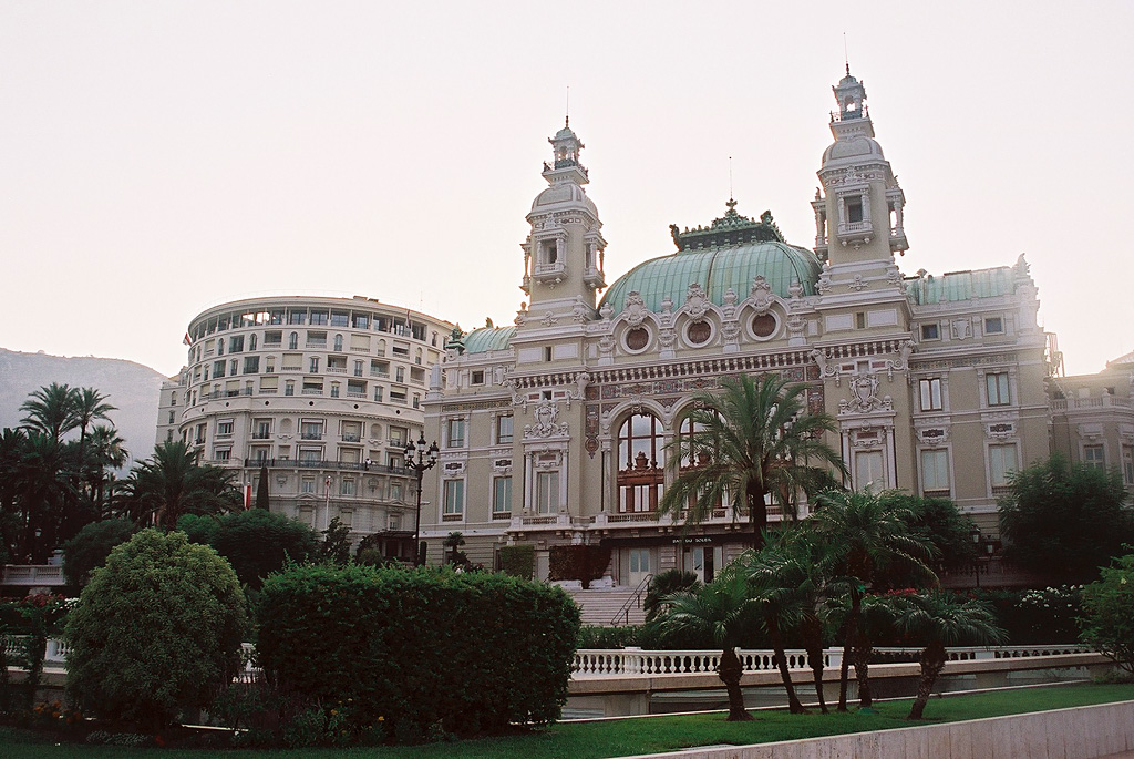 Monte Carlo, Monaco-Ville, Monaco